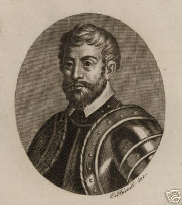 Roger de Flor en un grabado del siglo XIX.